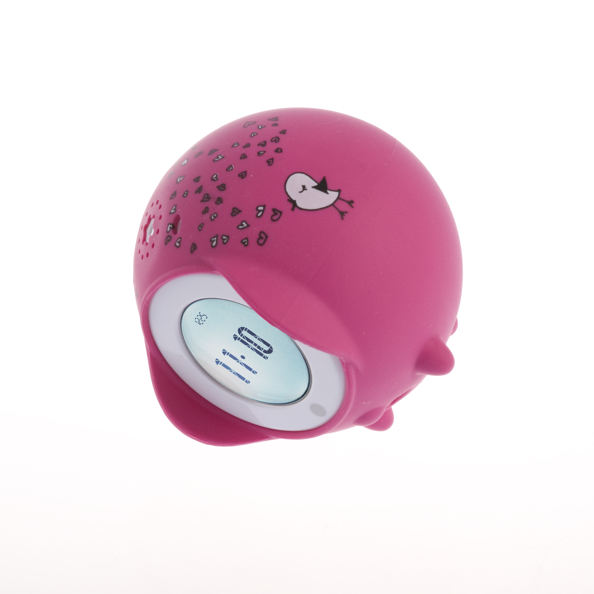 Uciekający Budzik Tocky Love od Nanda Home Inc